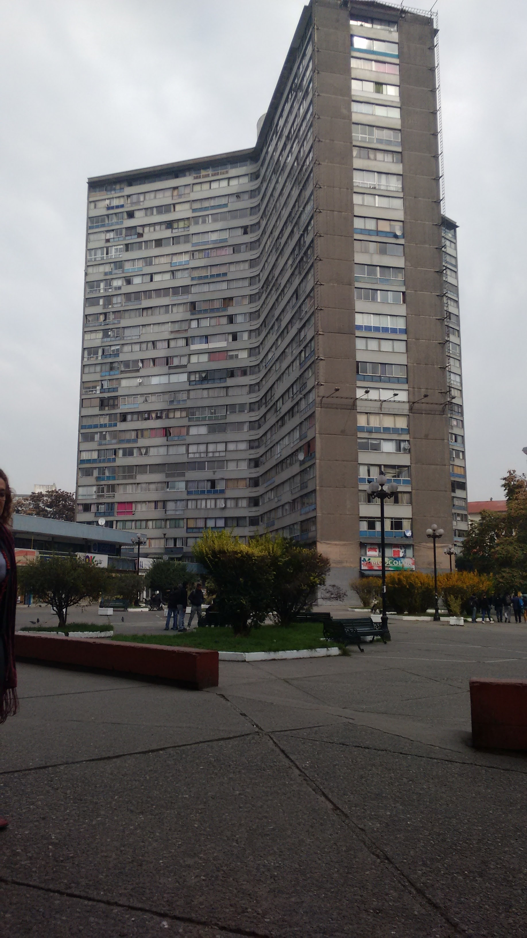 Fotografía tomada a la torre número II